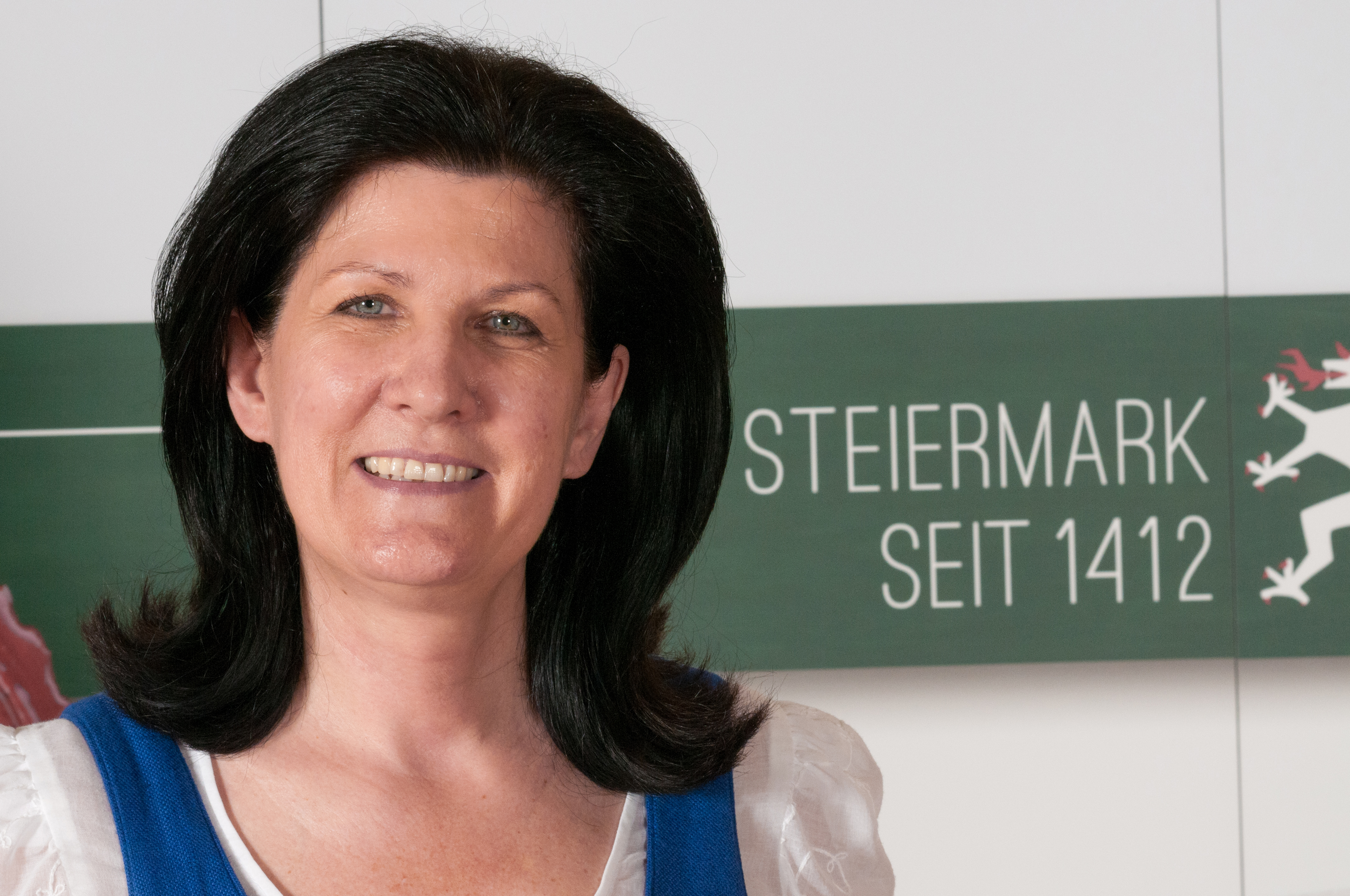 Landtagsprojekt Steiermark